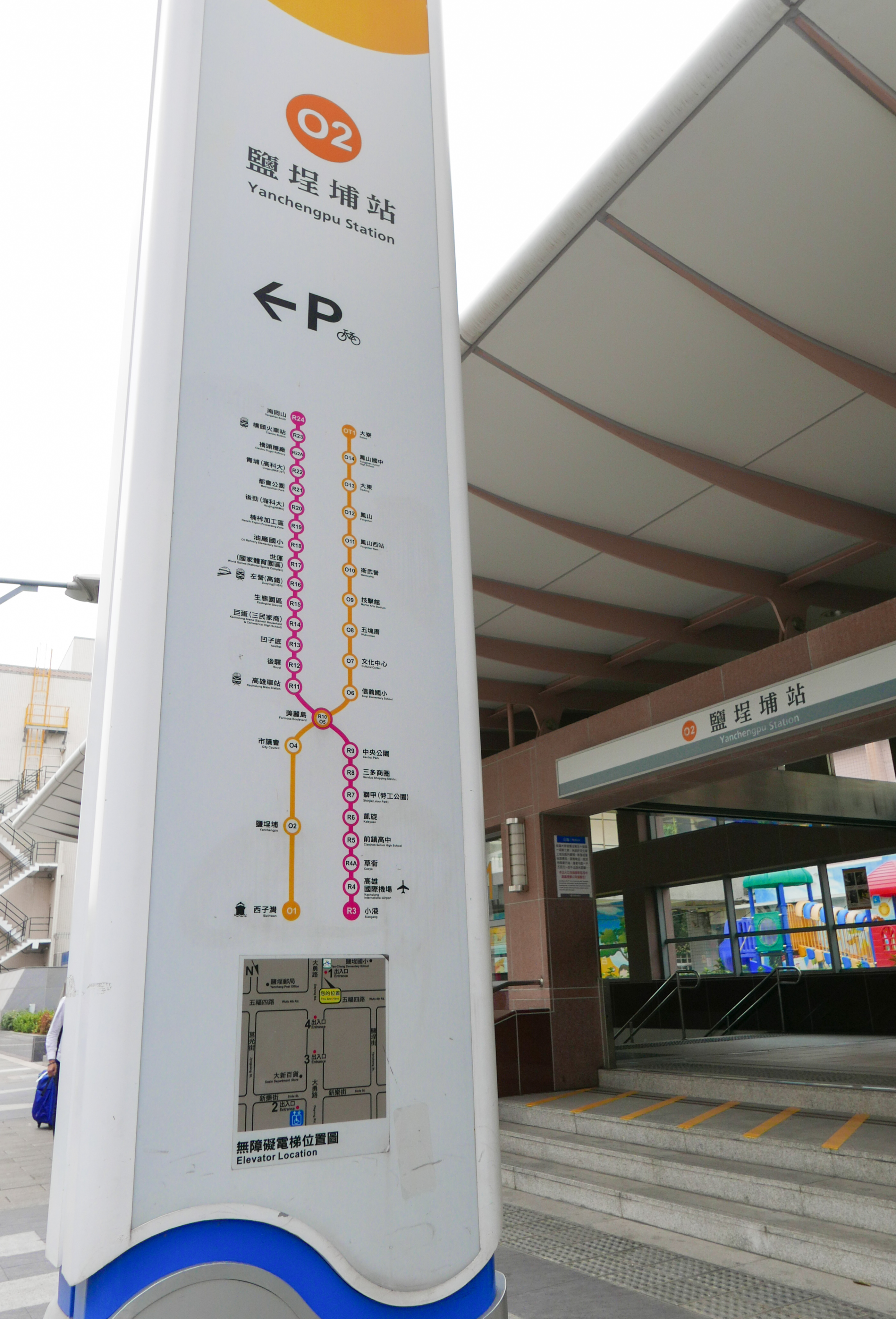 高雄捷運鹽埕埔站1號出口。